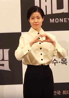 1월 8일 오후 서울시 강남구 논현동 임피리얼 팰리스 서울에서 tvN 새 수목드라마 '머니게임'의 제작발표회가 열려 배우 심은경, 고수, 이성민이 참석해 포토타임을 갖고 있다.